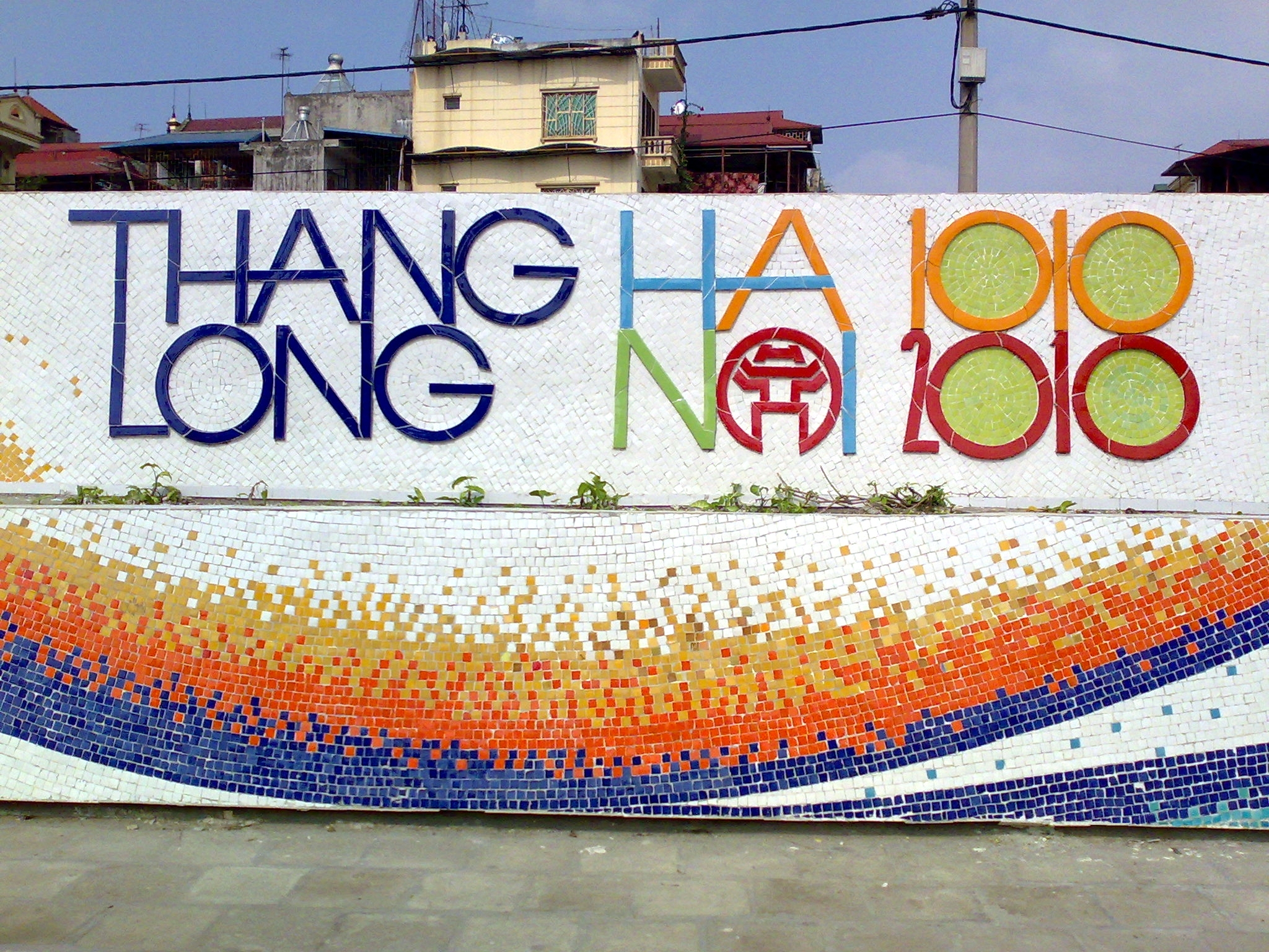 Thể loại:Làng nghề Hà Nội